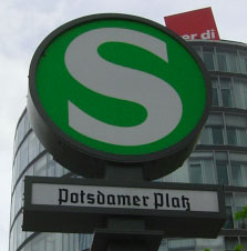 S-Bahn, logotyp, Potsdamer Platz, Berlin. Foto: Mangan2002